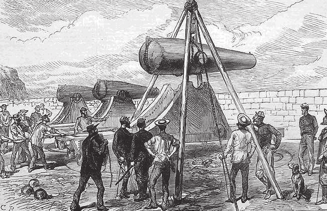 Eduardo Rivera Silva escribe: “The War in South America: Mounting Heavy Guns At Valparaiso” Imagen publicada en la revista británica The Illustrated London News el 15 de noviembre de 1879 y que muestra el montaje de uno de tres cañones Rodman, lo que indudablemente corresponde a la batería Esmeralda y es coincidente además del modo cómo se construyó. La débil cabria que eleva el cañón es –eso sí- una licencia del artista.